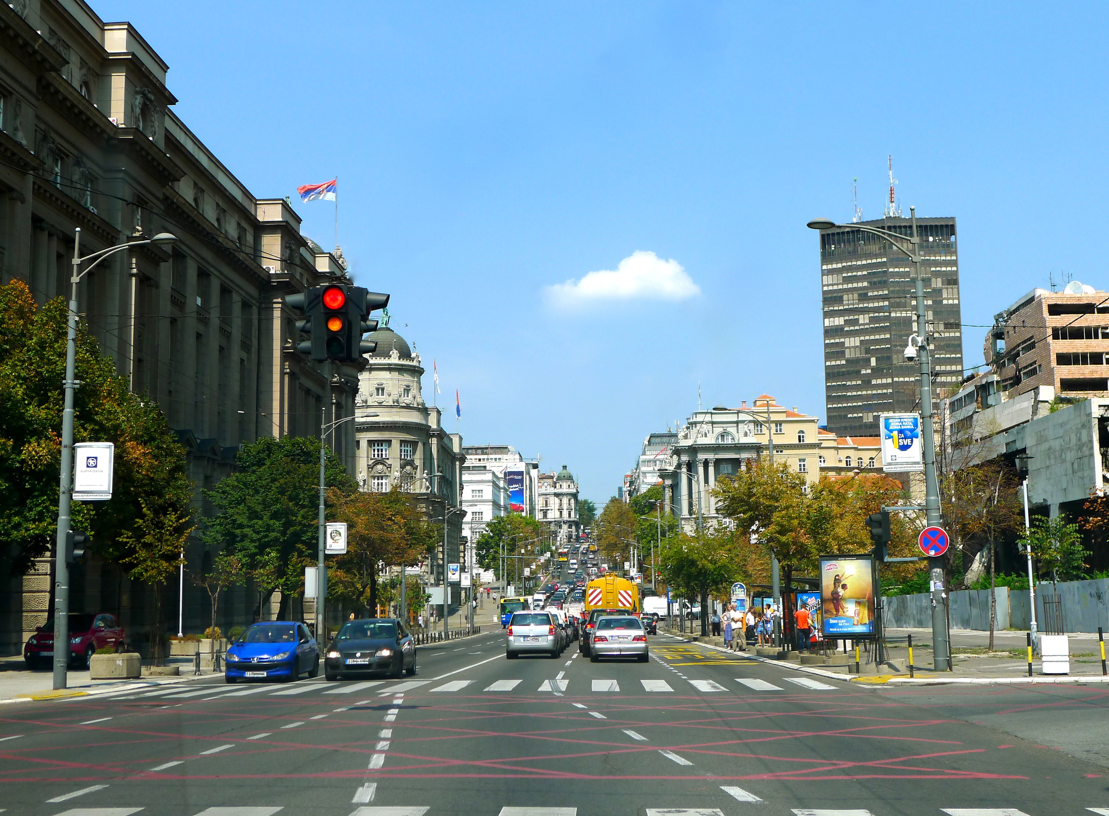 раскрсница са Немањином улицом